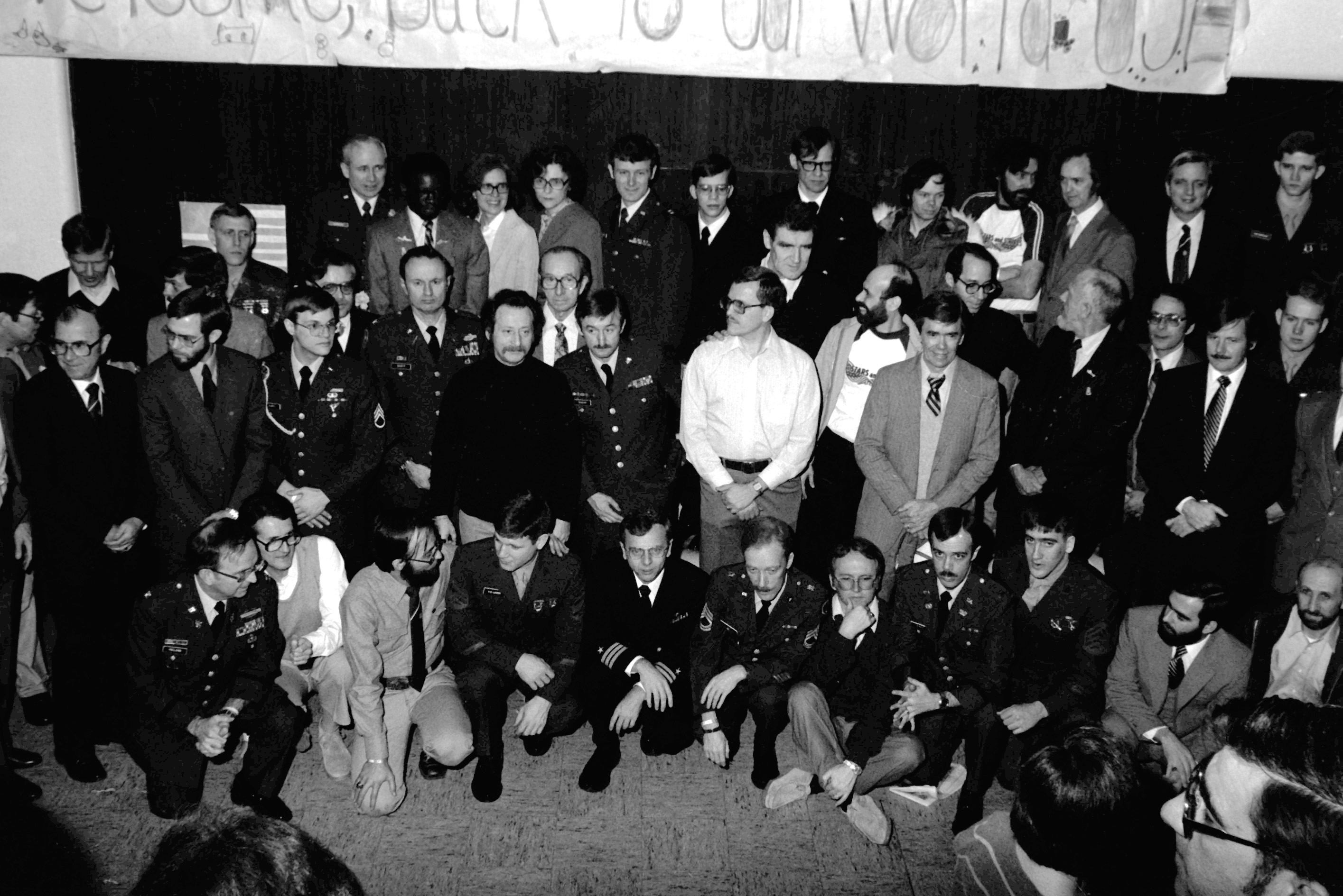 A group photograph of former hostages in the hospital. The 52 hostages are spending a few days in the hospital after their release from Iran prior to their departure for the United States.